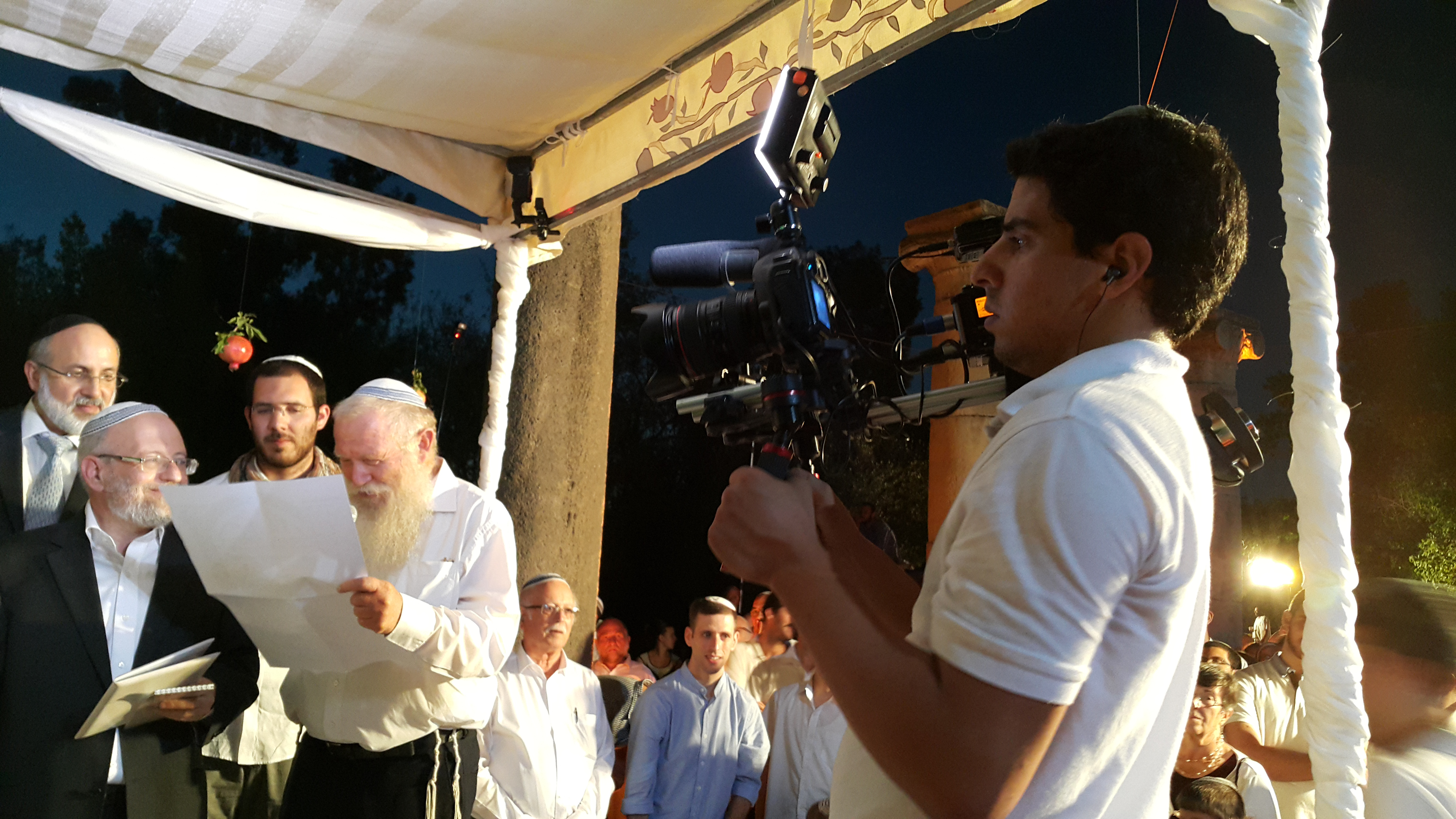 צלם חתונות